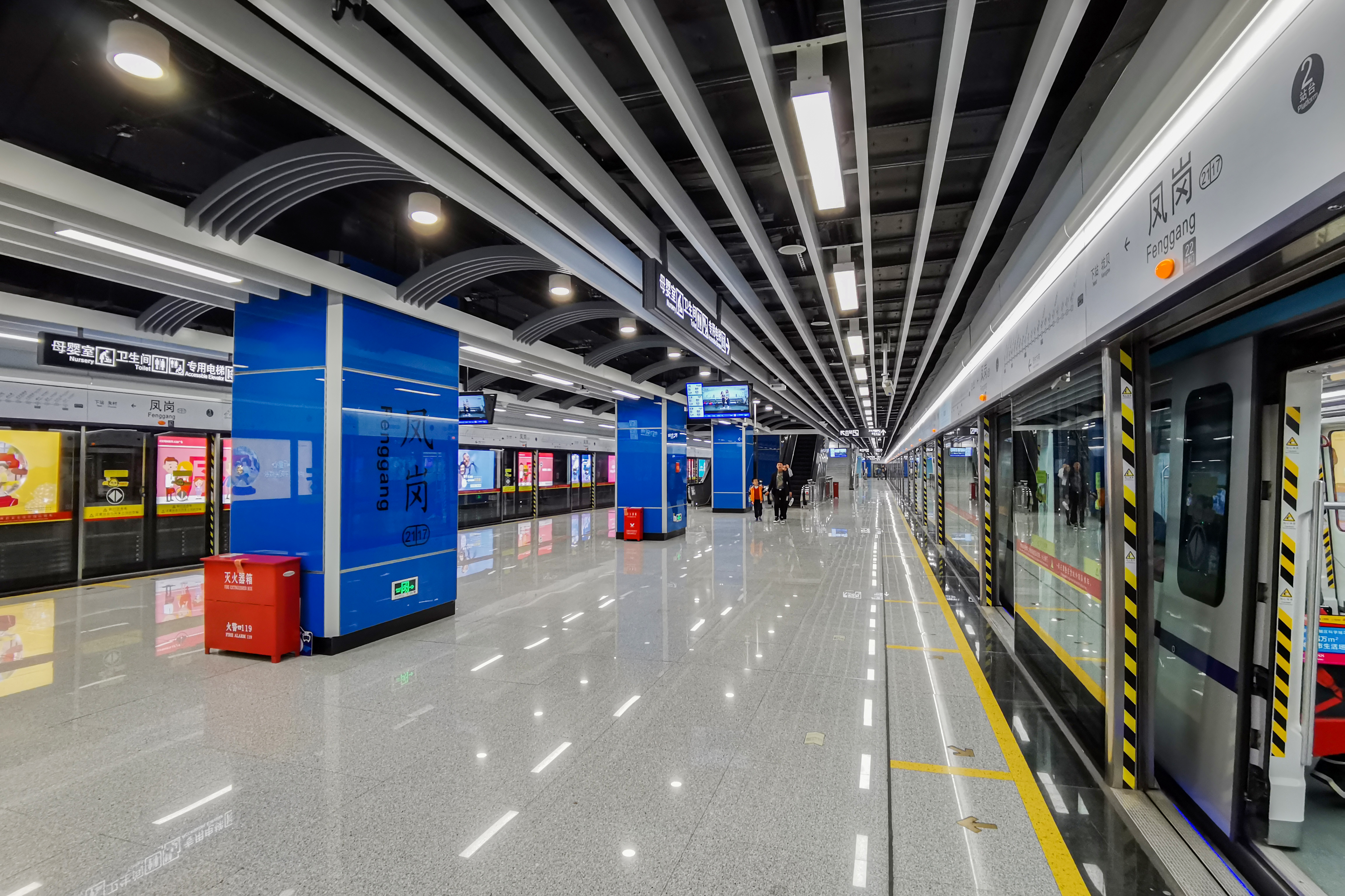 广州地铁凤岗站